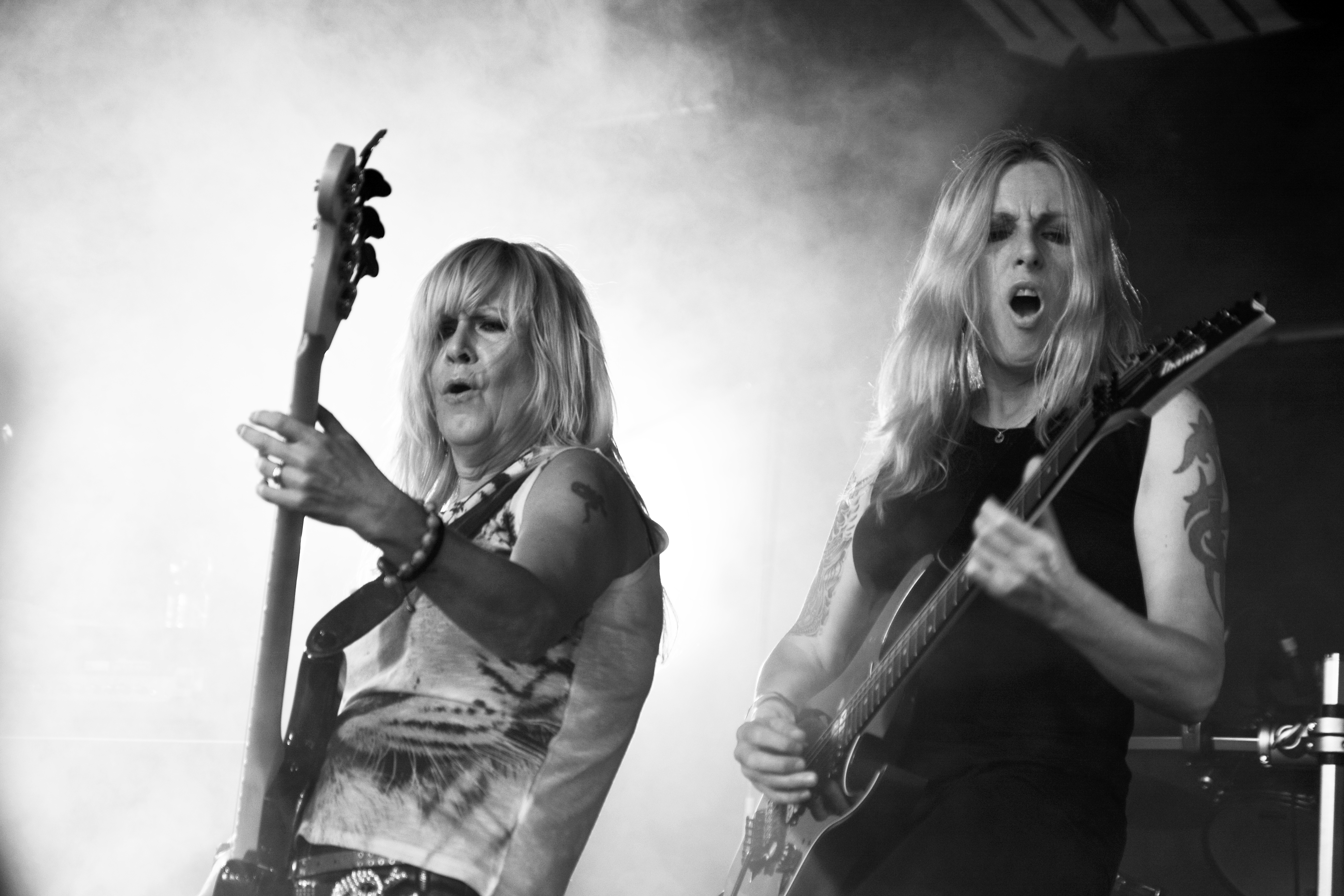 Rock Goddess beim Headbangers Open Air 2015